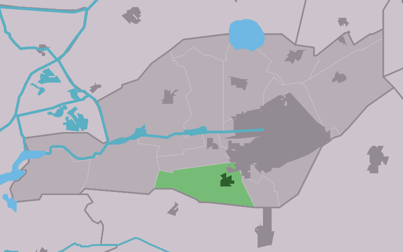 Kaartsje fan himrik fan Boarnburgum